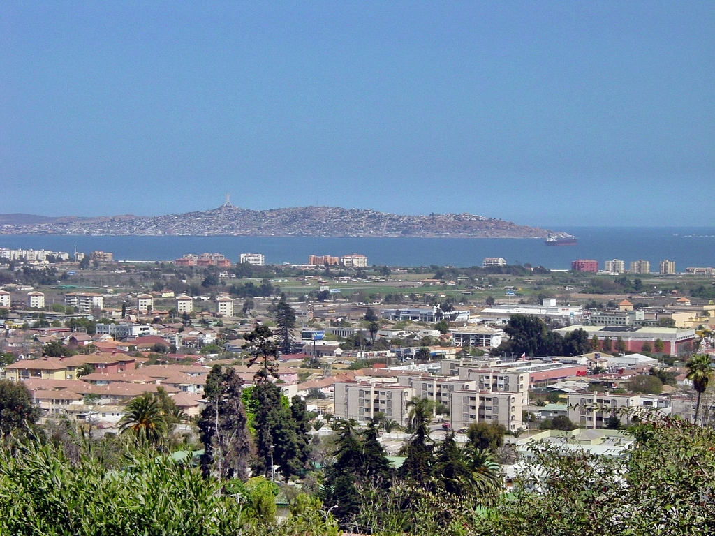 Conurbación La Serena-Coquimbo, Chile.